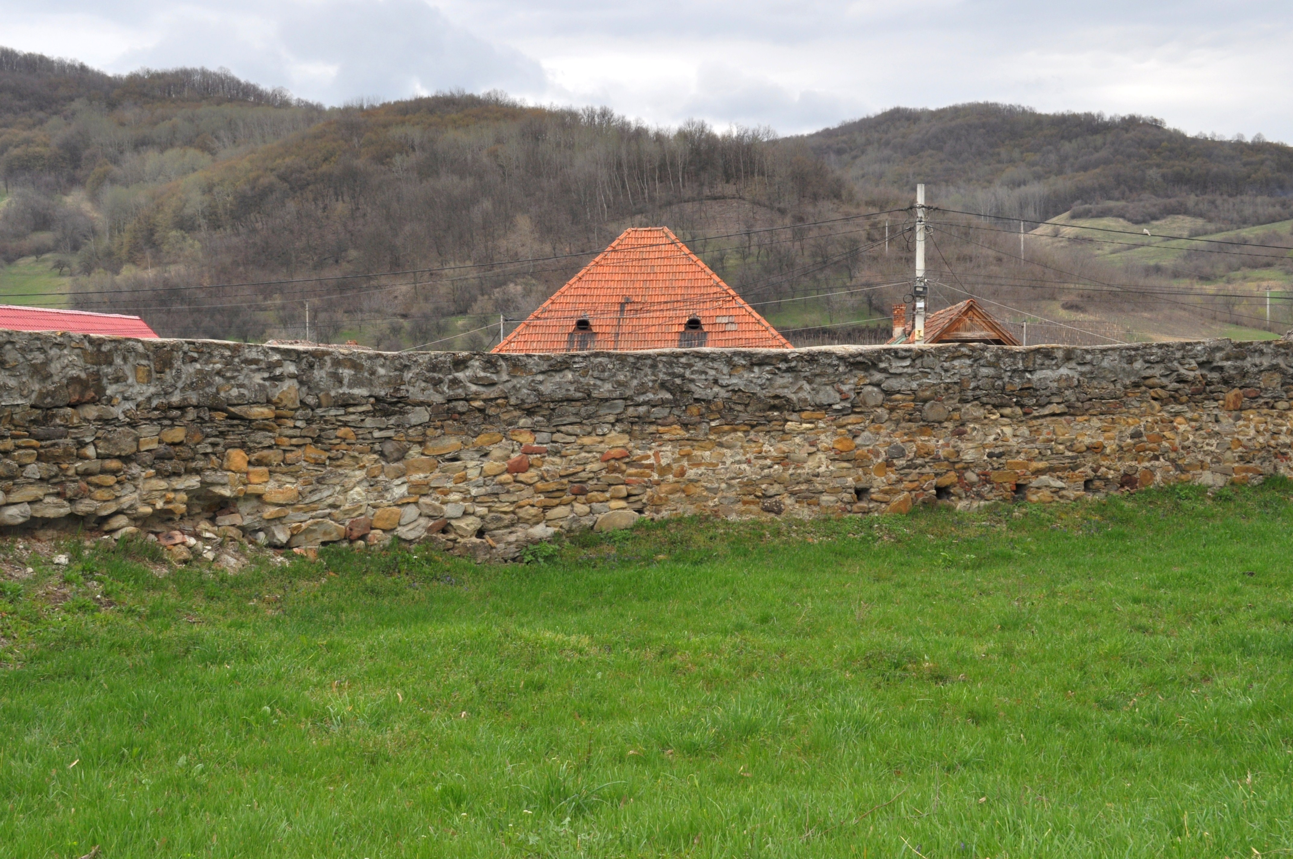 Ansamblul bisericii evanghelice, sat VALEA LUNGĂ; comuna VALEA LUNGĂ, județul Alba